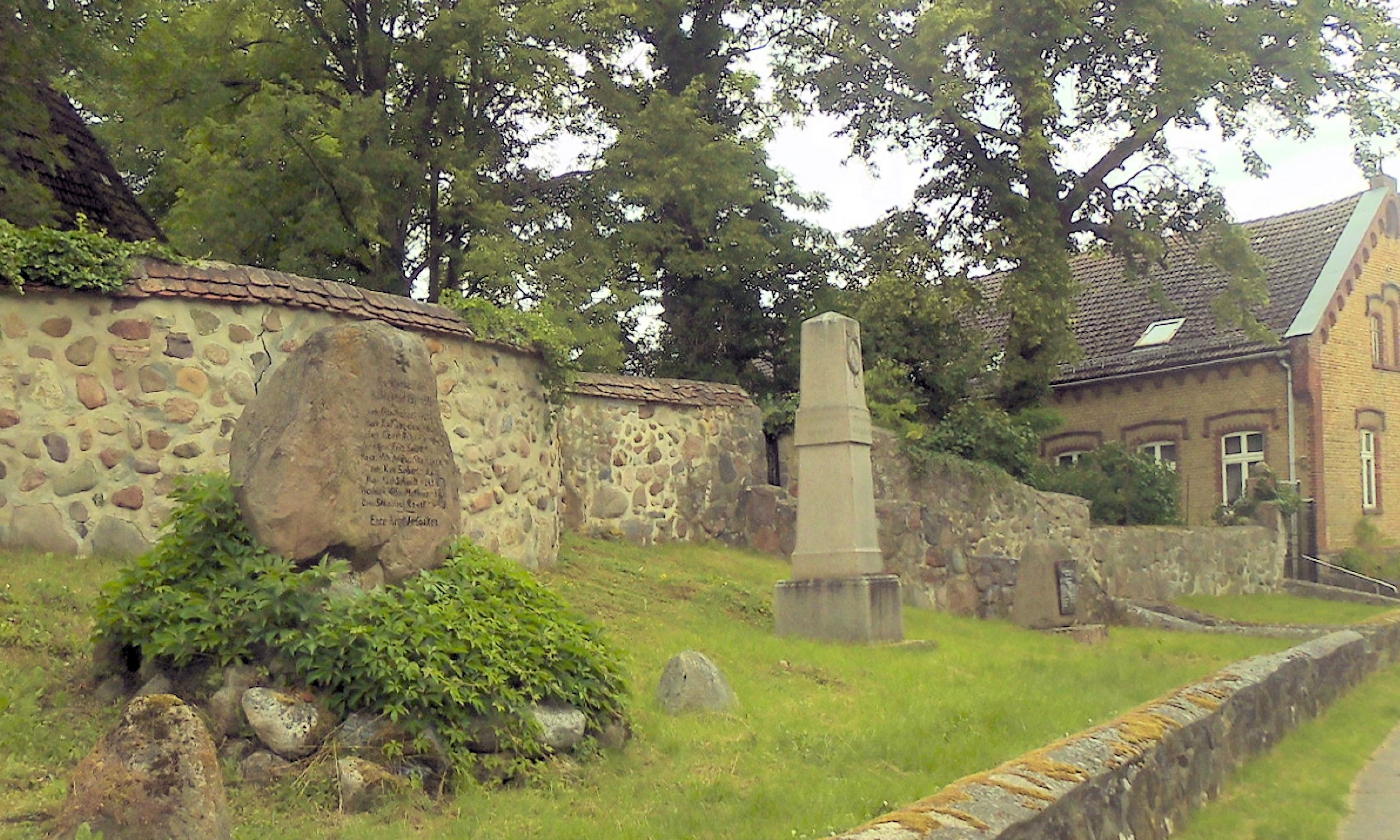 Gefallenendenkmale des Ersten und Zweiten Weltkrieges in Lübbenow, Gemeinde Uckerland